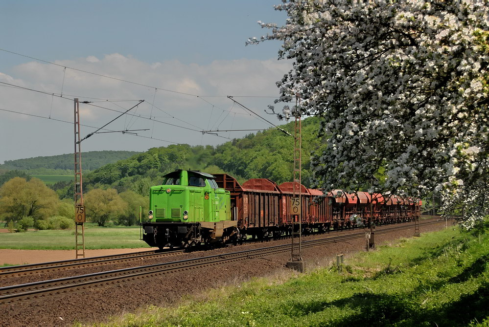 V100 01 bei Einbeck Salzderhelden